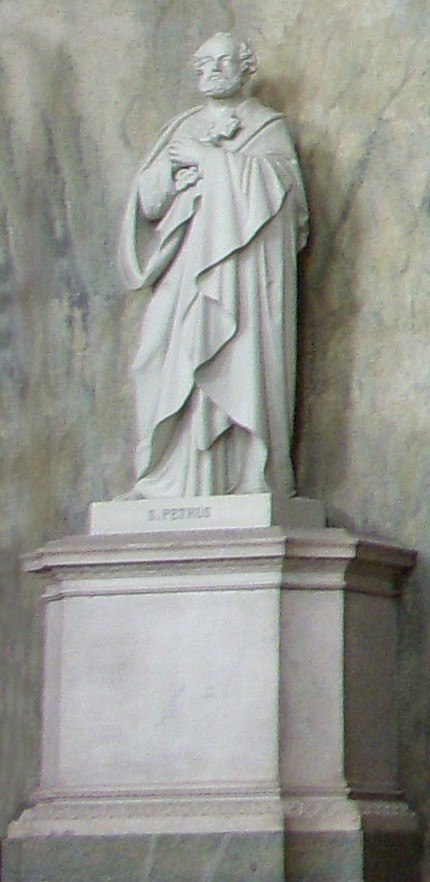 Staty visande Petrus i Slottskyrkan, Stockholm